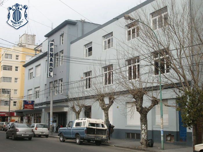 La fachada de la sede del Club Peñarol, ubicada en las calles Garay y Santiago del Estero.